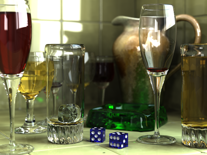 Questa è una qualità fotografica immagine (CG) generati dal computer creato da me (Gilles Tran) usando POV-Ray 3.6 (Persistence of Vision Ray-tracer) al fine di dimostrare la capacità di rendering di POV-Ray. Gli occhiali, posacenere e brocca erano modellati con Rhino e i dadi con Cinema 4D. POV-Ray il codice per quest'immagine è disponibile qui (file zip, 6 Mb). Il codice è anche rilasciato nel pubblico dominio. Vedi anche più grandi Image:Glasses 800 edit.png, che è un'immagine in vetrina su Wikipedia inglese.